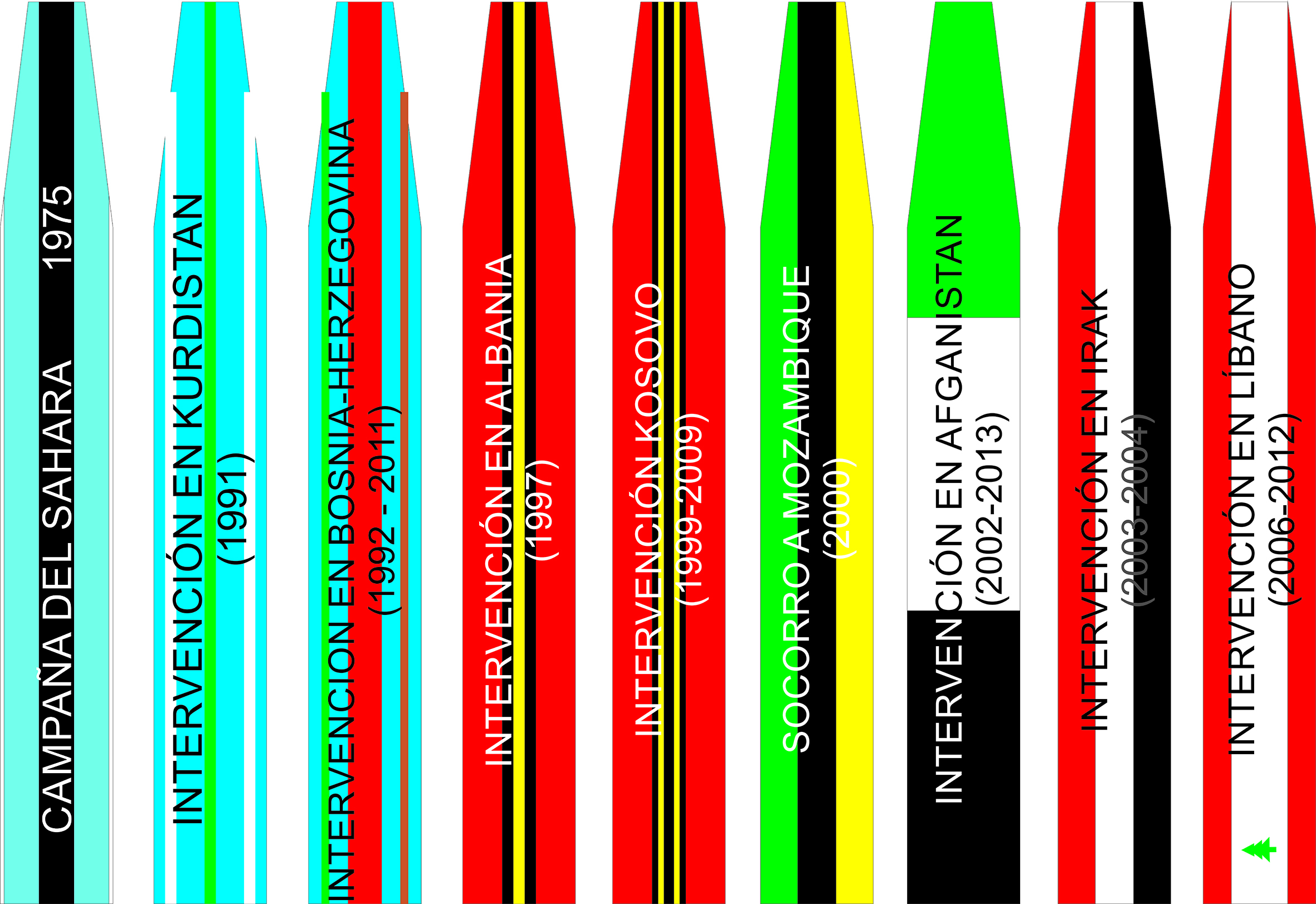 Corbatas de las medallas del Batallón de Helicópteros de Emergencias